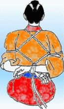 Hojojutsu